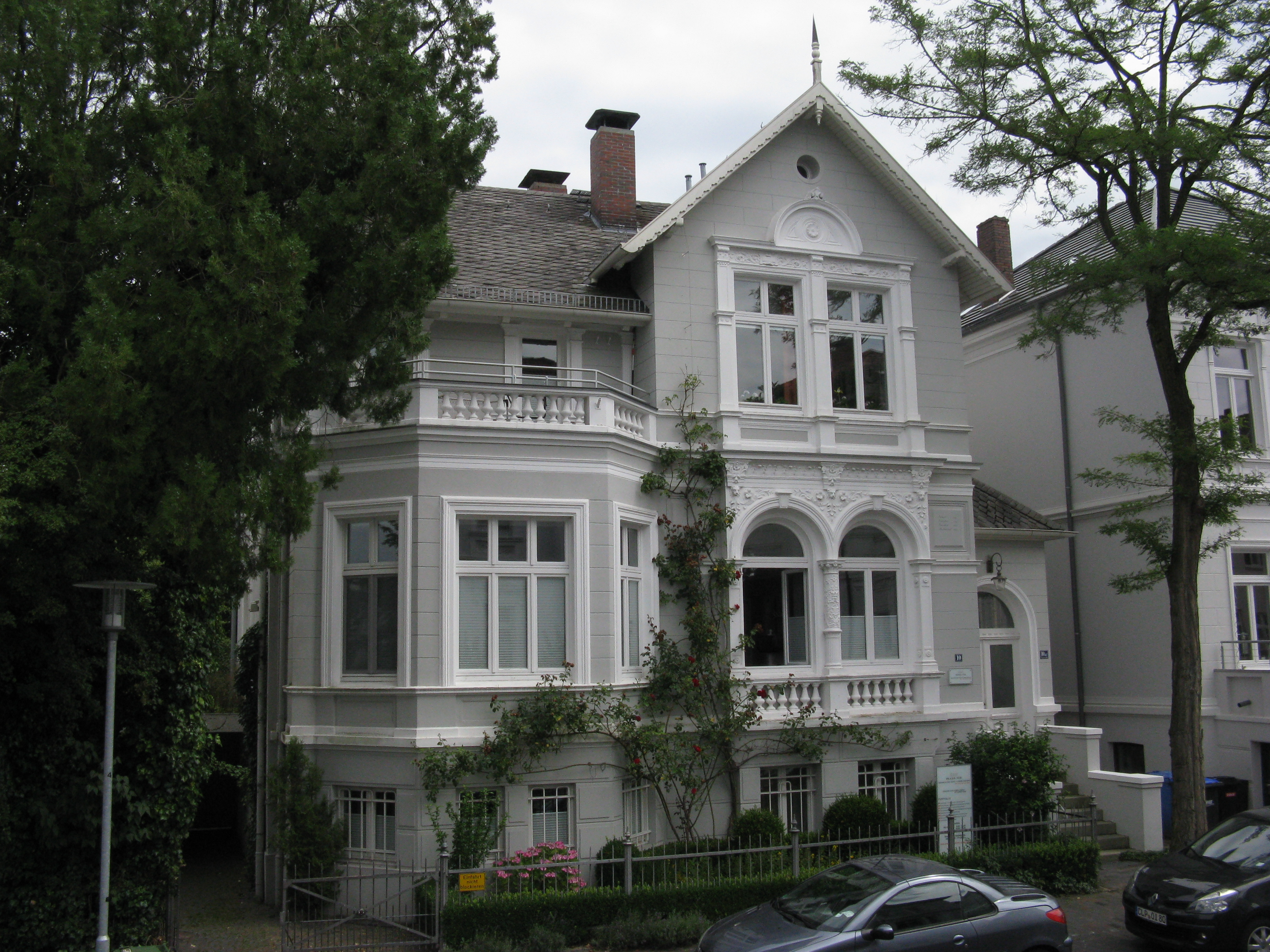 Oldenburger Hundehütte